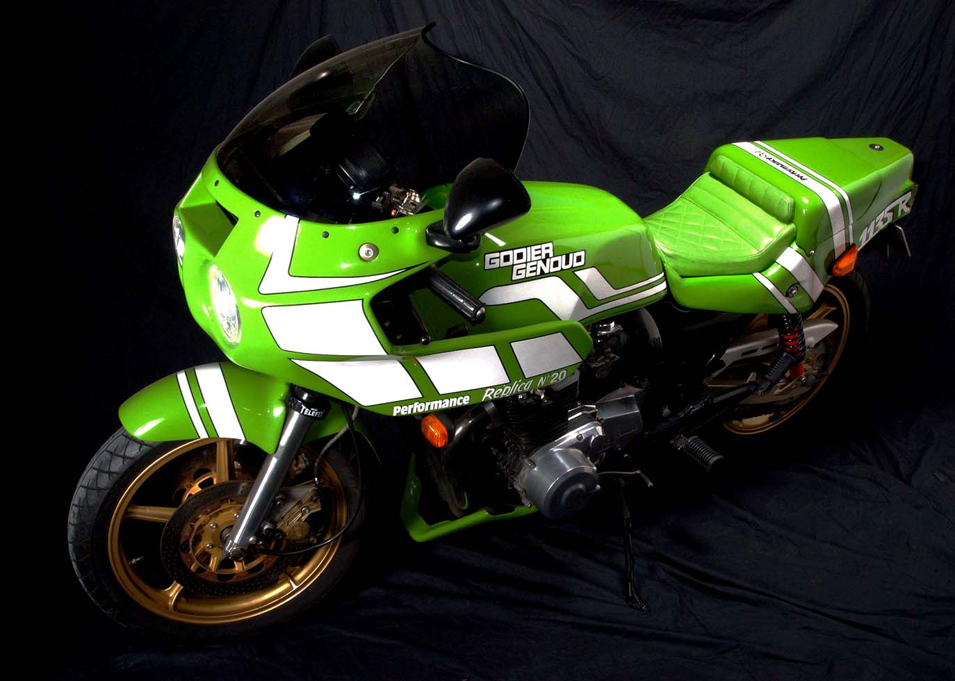 撮影は投稿者本人Kawasaki Godier Genoud 1135R